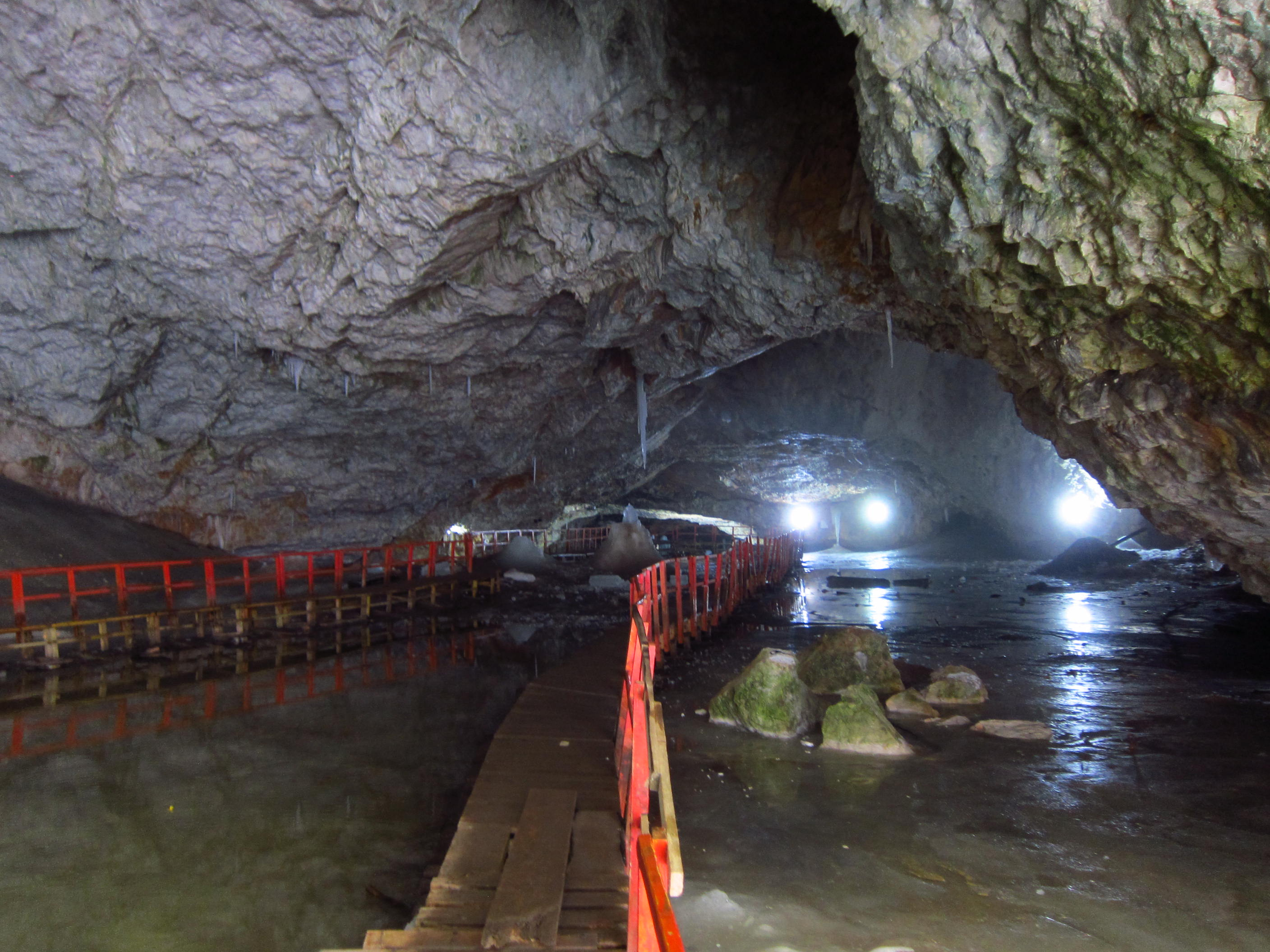 Der "Kirchensaal" der Scărișoara-Höhle am am 16.06.2017